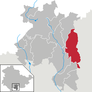 Judenbach in Thüringen, Landkreis Sonneberg